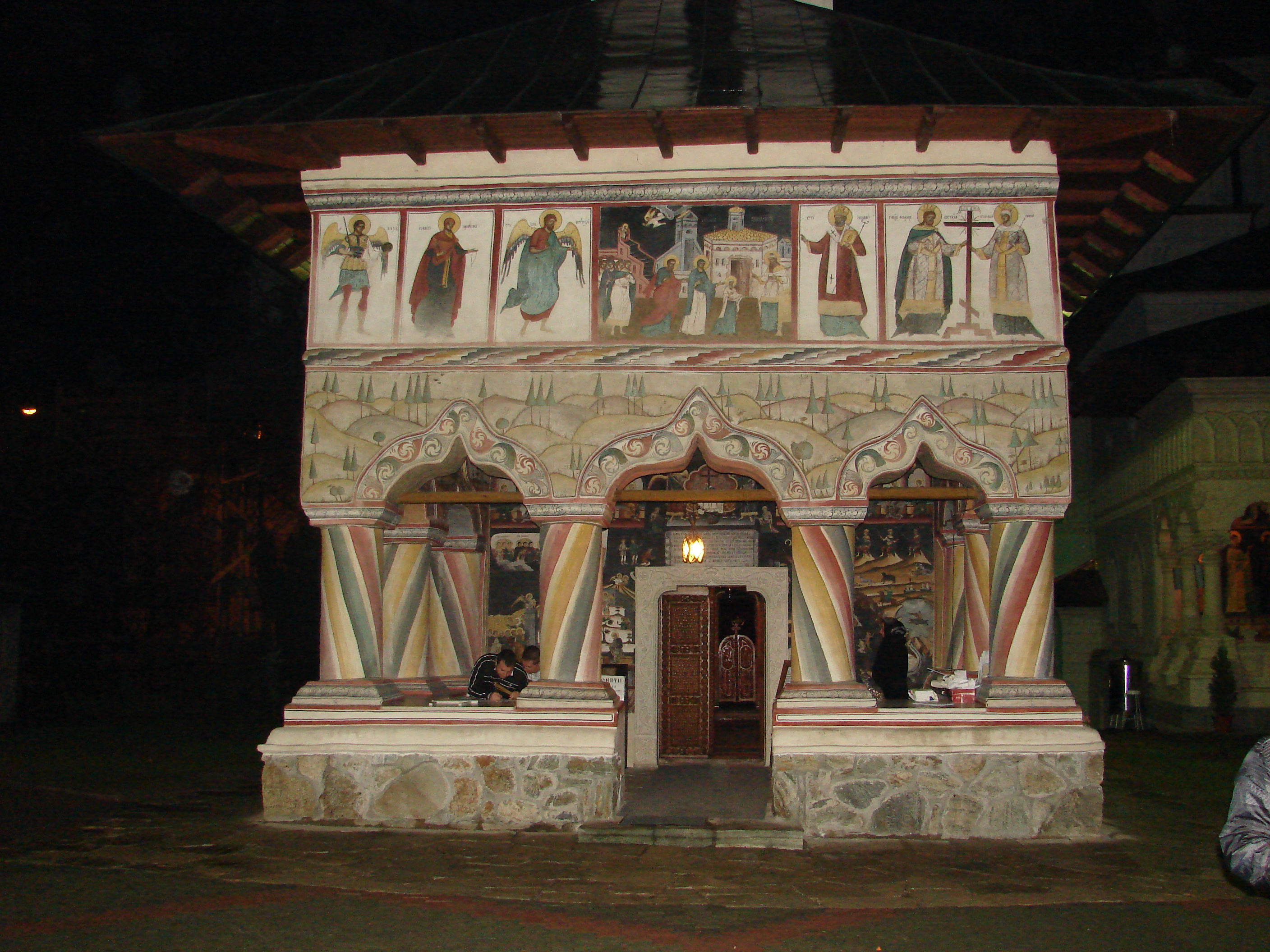 Intrarea de la biserica veche, noaptea.